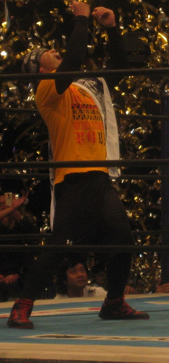 2013年11月9日 大阪府立体育会館 「POWER STRUGGLE」 外道